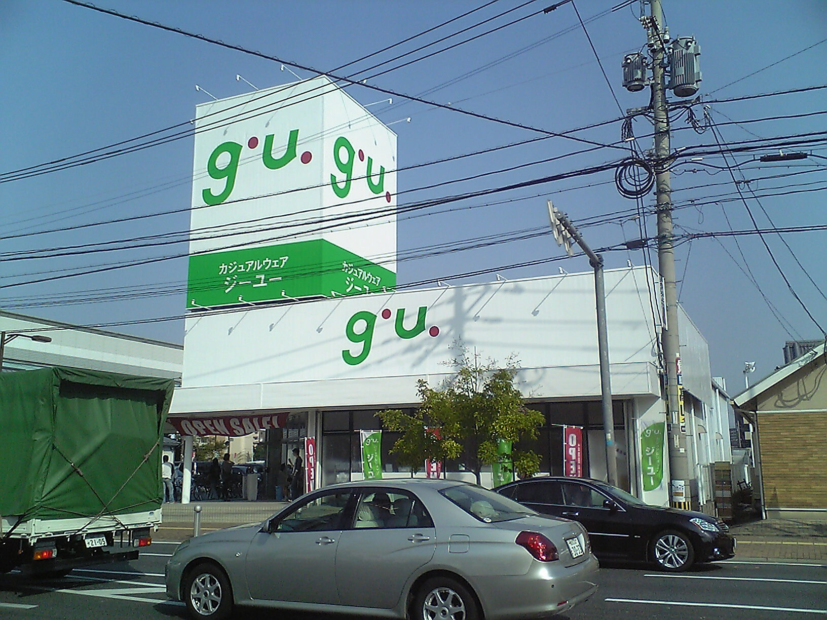 ジーユー姪浜店（福岡市西区）